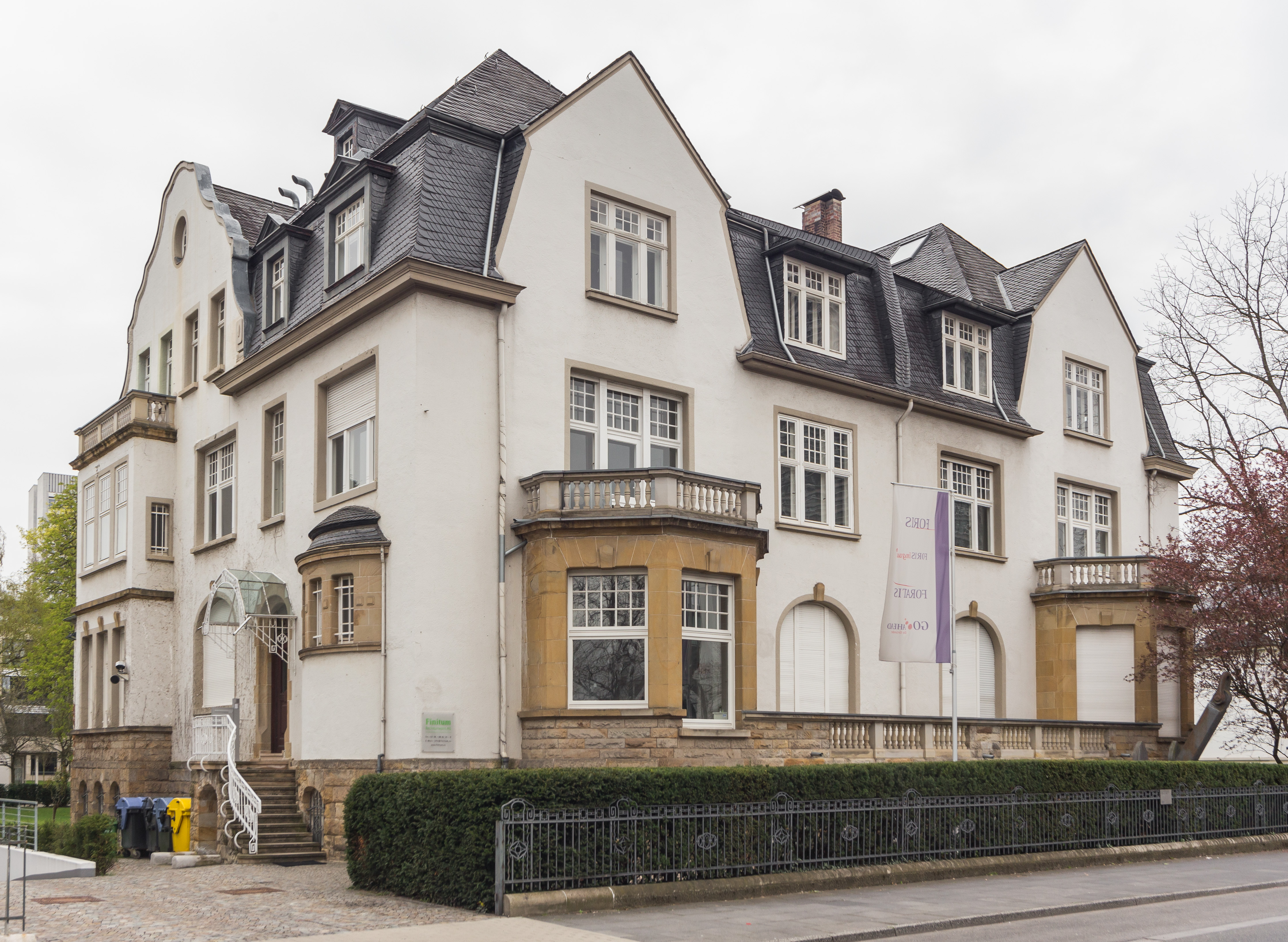 Doppelvilla (ehem. Landesvertretung Hamburg), Kurt-Schumacher-Straße 20 (li.)-18 (re.), Bonn